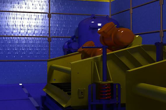 Вибрационное сито с одной декой